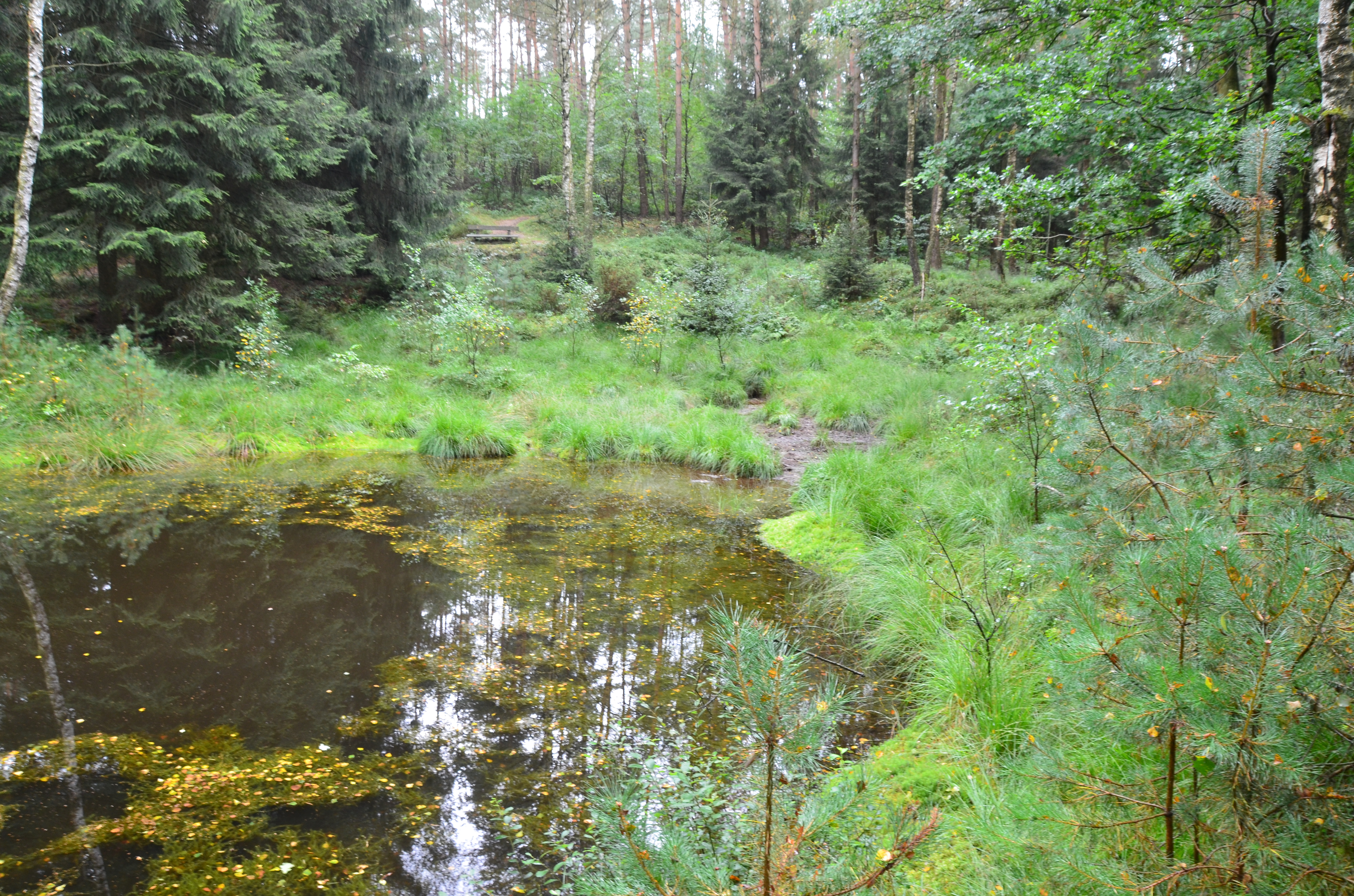 Die Luhequelle bei Timmerloh, Soltau-Deimern. Das Quellgebiet war um 1900 offene Heidelandschaft und wurde später aufgeforstet. Die Luhe tritt erst bei Bispingen endgültig zutage.